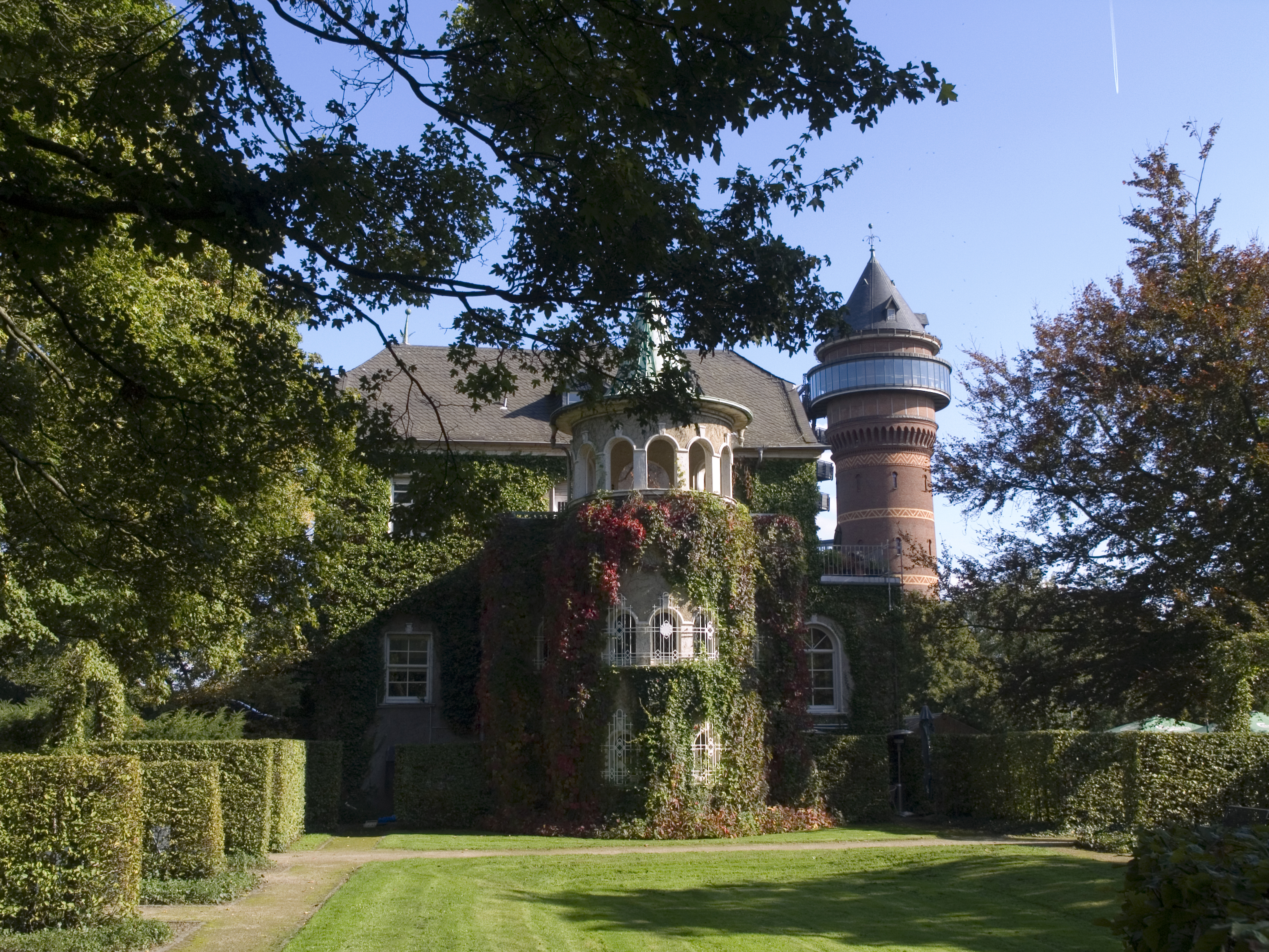 Северный Рейн-Вестфалия, Мюльхайм-на-Руре - замок Штюрум